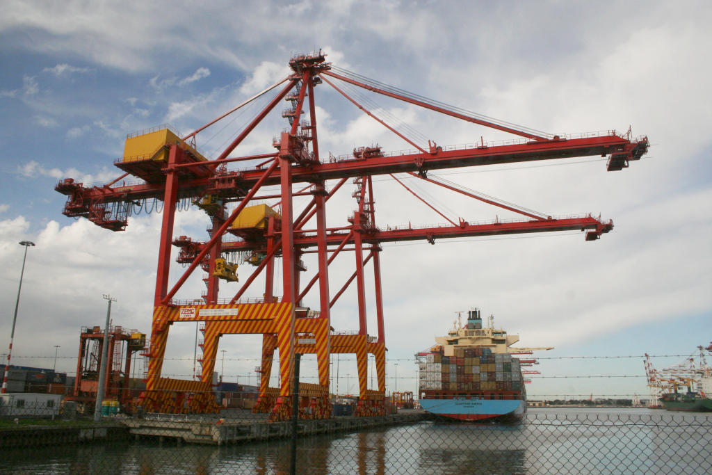 Melbourne - container crane at swanson dock